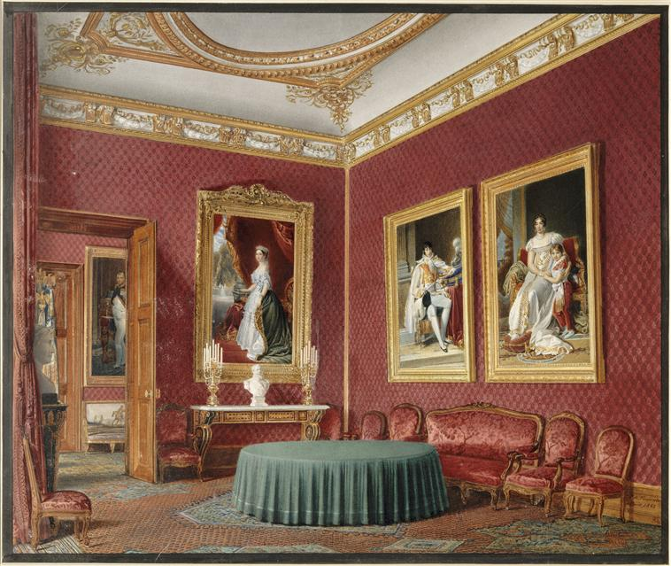 La Salle du conseil des ministres aux Tuileries